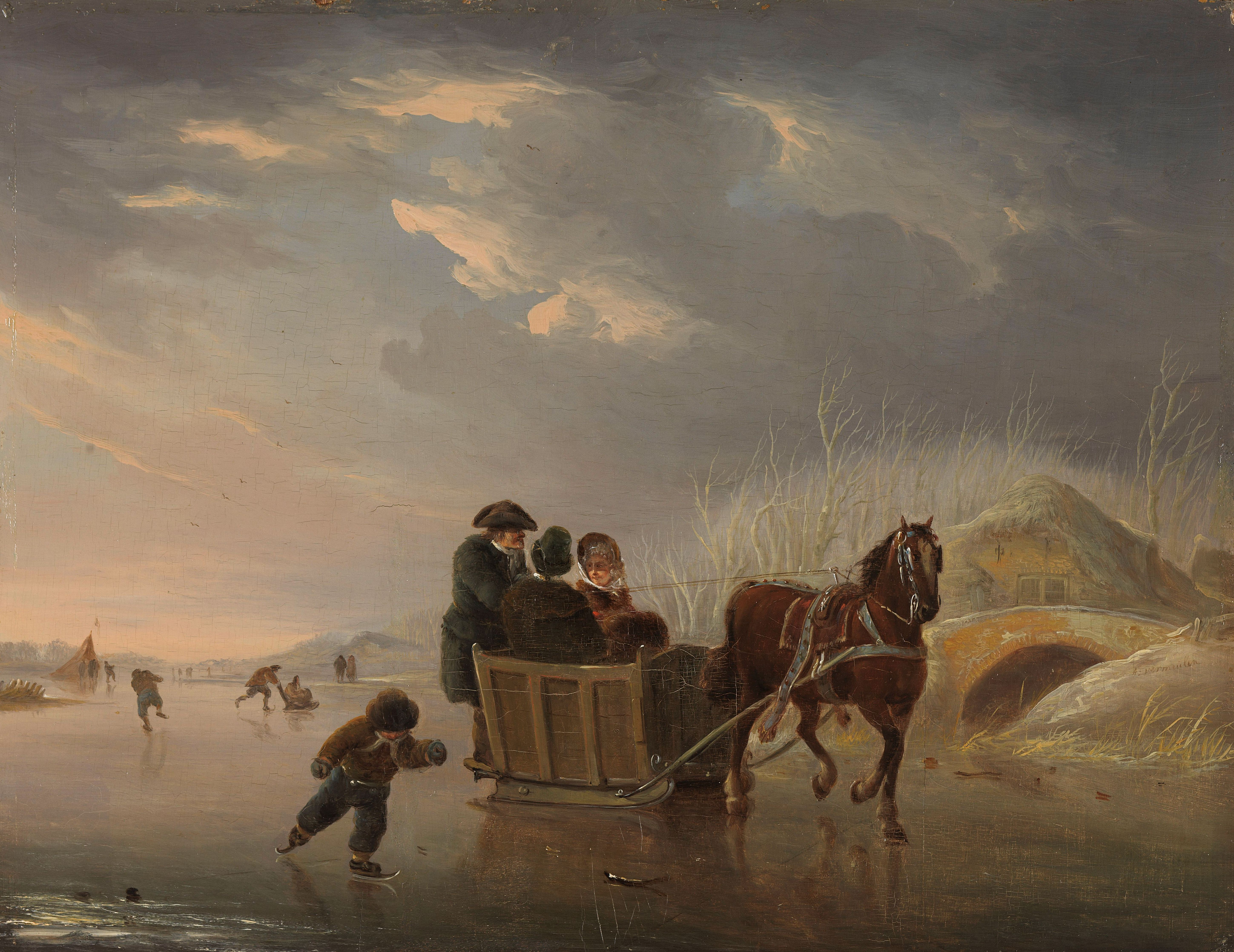 Sledevaart op het ijs. Winterlandschap met een arrenslee en schaatsers op het ijs.